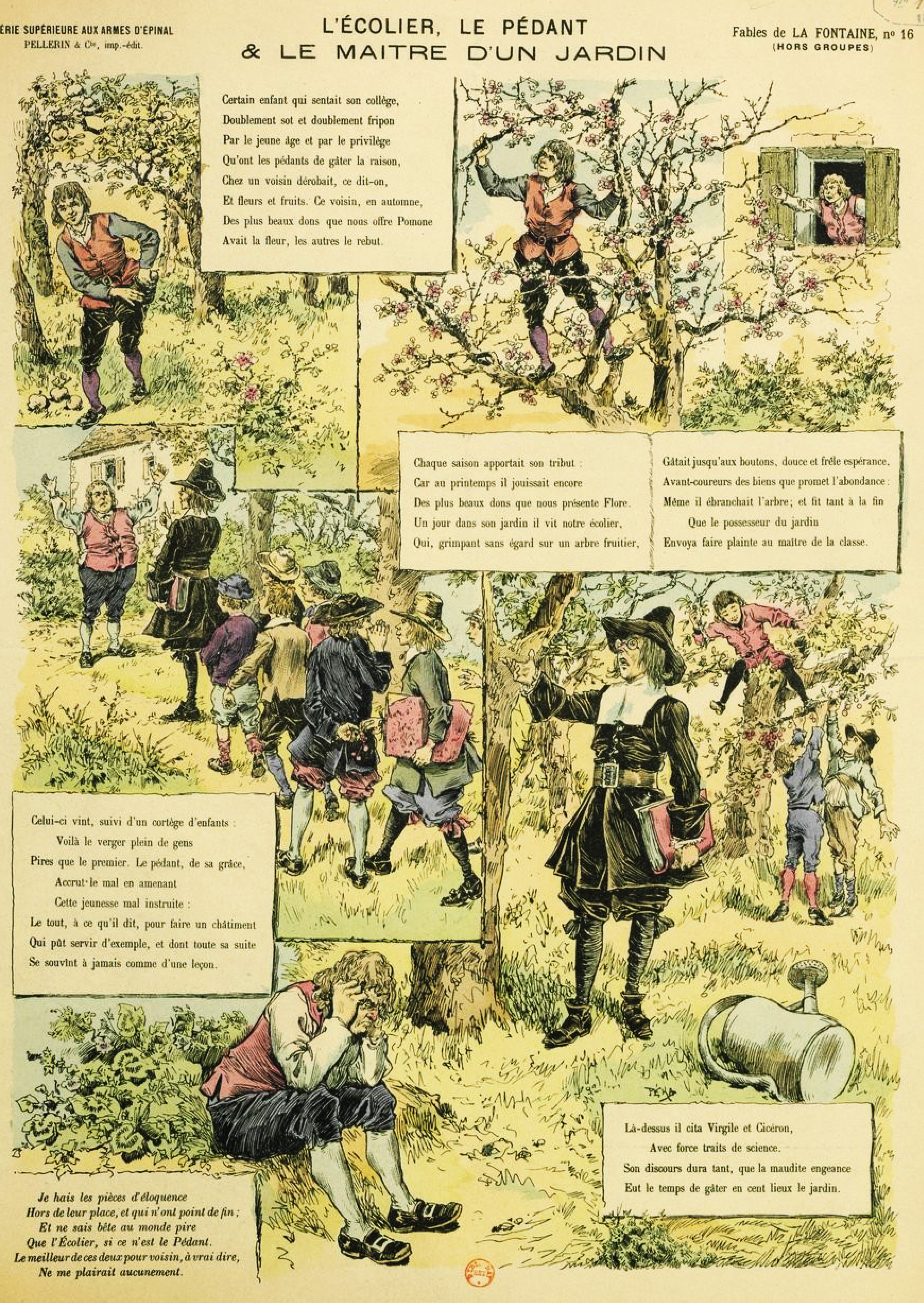 Estampe réalisée par E. Phosty représentant la fable L'Écolier, le Pédant et le Maître d'un jardin de Jean de La Fontaine (Epinal, édition Pellerin & Cie, 1895).